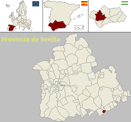 Mapa de localización del municipio sevillano de Algámitas (Andalucía, España)